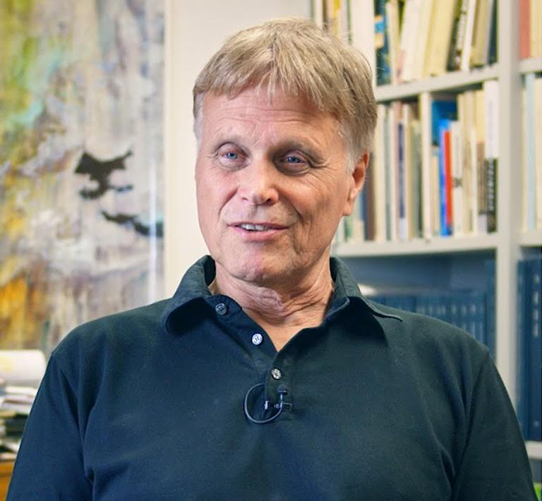 Die Wüste ist eine faszinierende Landschaft – und ein einzigartiges Forschungslabor: Seit Jahrzehnten untersucht Stefan Kröpelin von der Universität zu Köln die geologische Entwicklung der Sahara. Und von ihr weiß er viel zu erzählen. Der Stifterverband und die Deutsche Forschungsgemeinschaft haben Stefan Kröpelin im Jahr 2017 mit dem Communicator-Preis ausgezeichnet. Weitere Videos aus der "Forschergestalten"-Reihe: Der YouTube-Kanal des Stifterverbandes: Die Zukunftsmacher und ihre Visionen für Bildung und Ausbildung, Forschung und Technik Ein Film von Damian W. Gorczany und Stoyan Radoslavov Motion Grafik: Johannes LDC Guerreiro Musik: Lubomir Brashnenkov Dieses Video steht unter der CC-Lizenz CC BY-NC-SA 4.0 Namensnennung - Nicht-kommerziell - Weitergabe unter gleichen Bedingungen 4.0 International